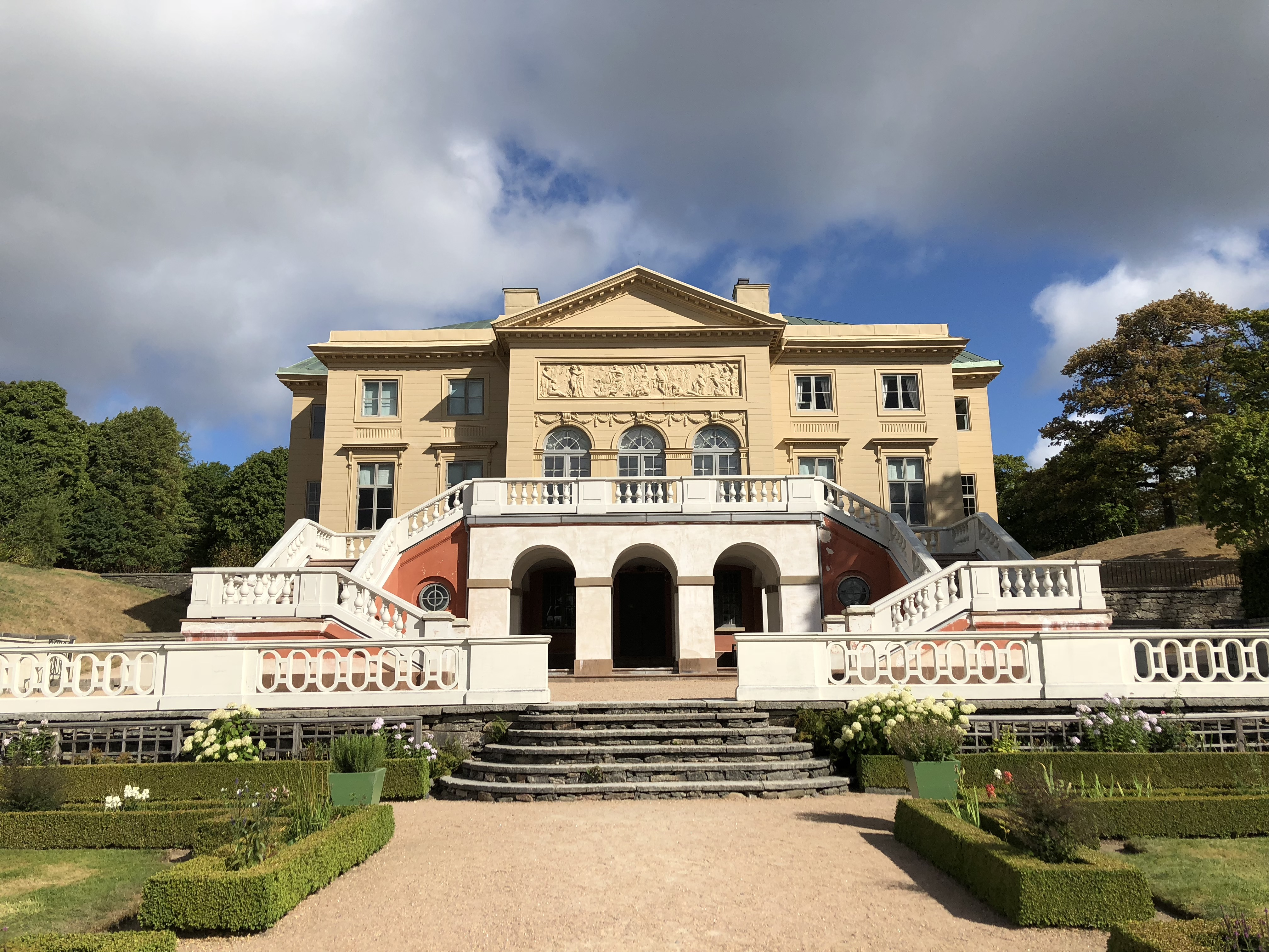 Gunnebo slott, huvudfasaden mot södra stilträdgården med fritrappan.